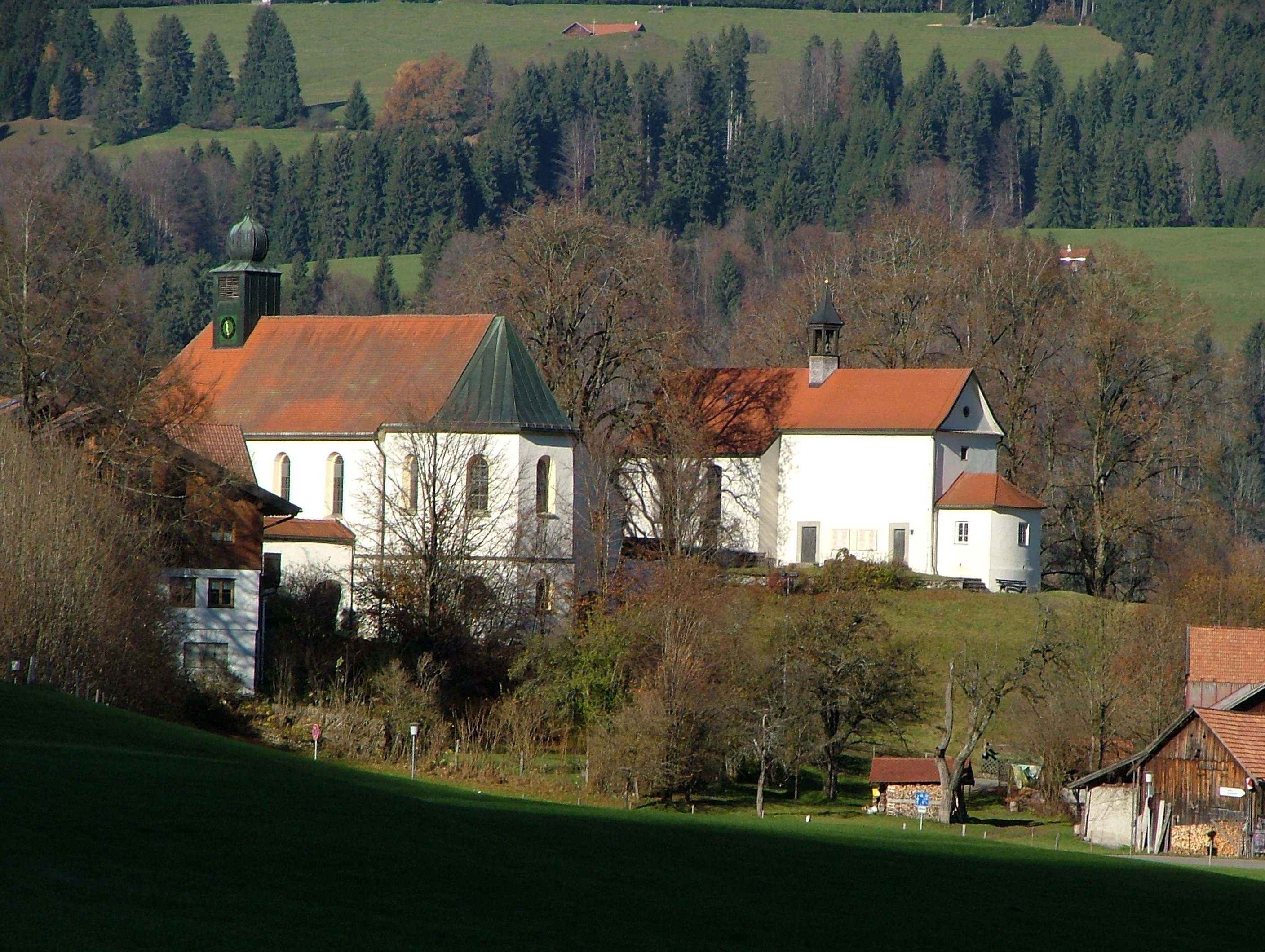 Bühl am Alpsee